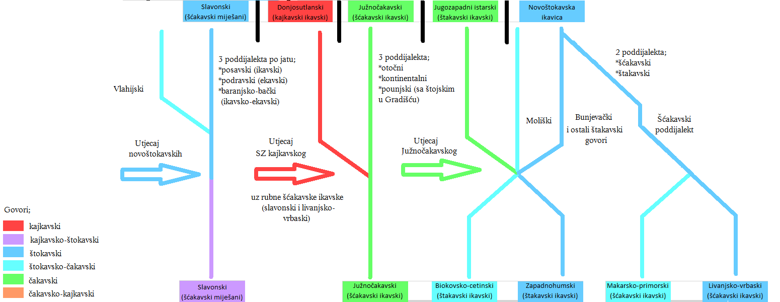 Struktura i razvoj ikavskih govora/dijalekata u Hrvata